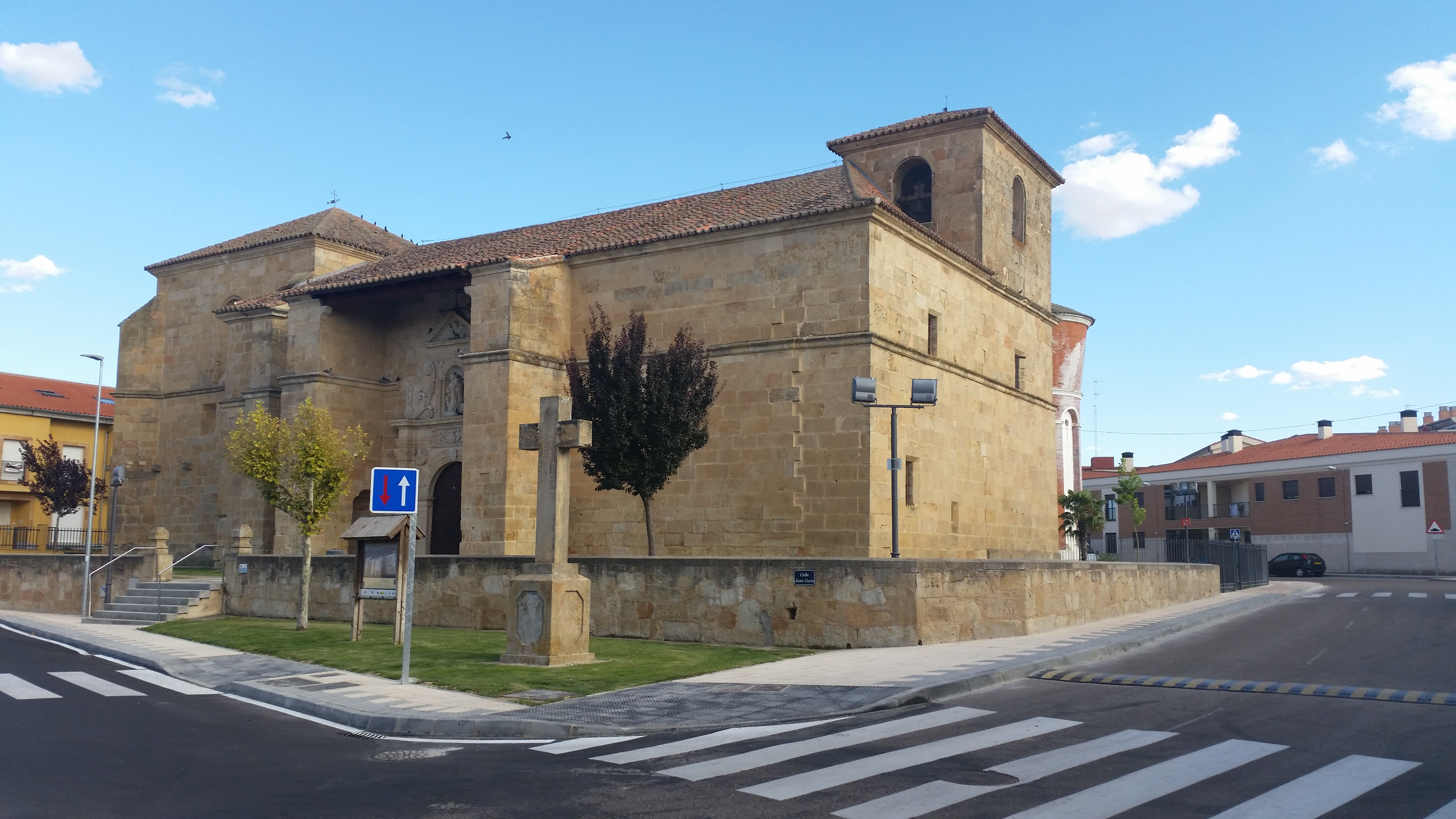 Imagen de la Iglesia de San Esteban en Castellanos de Moriscos, Salamanca.